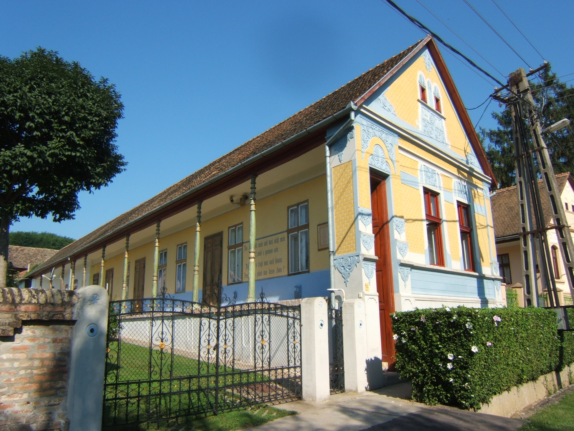 Feked, jellegzetes lakóház